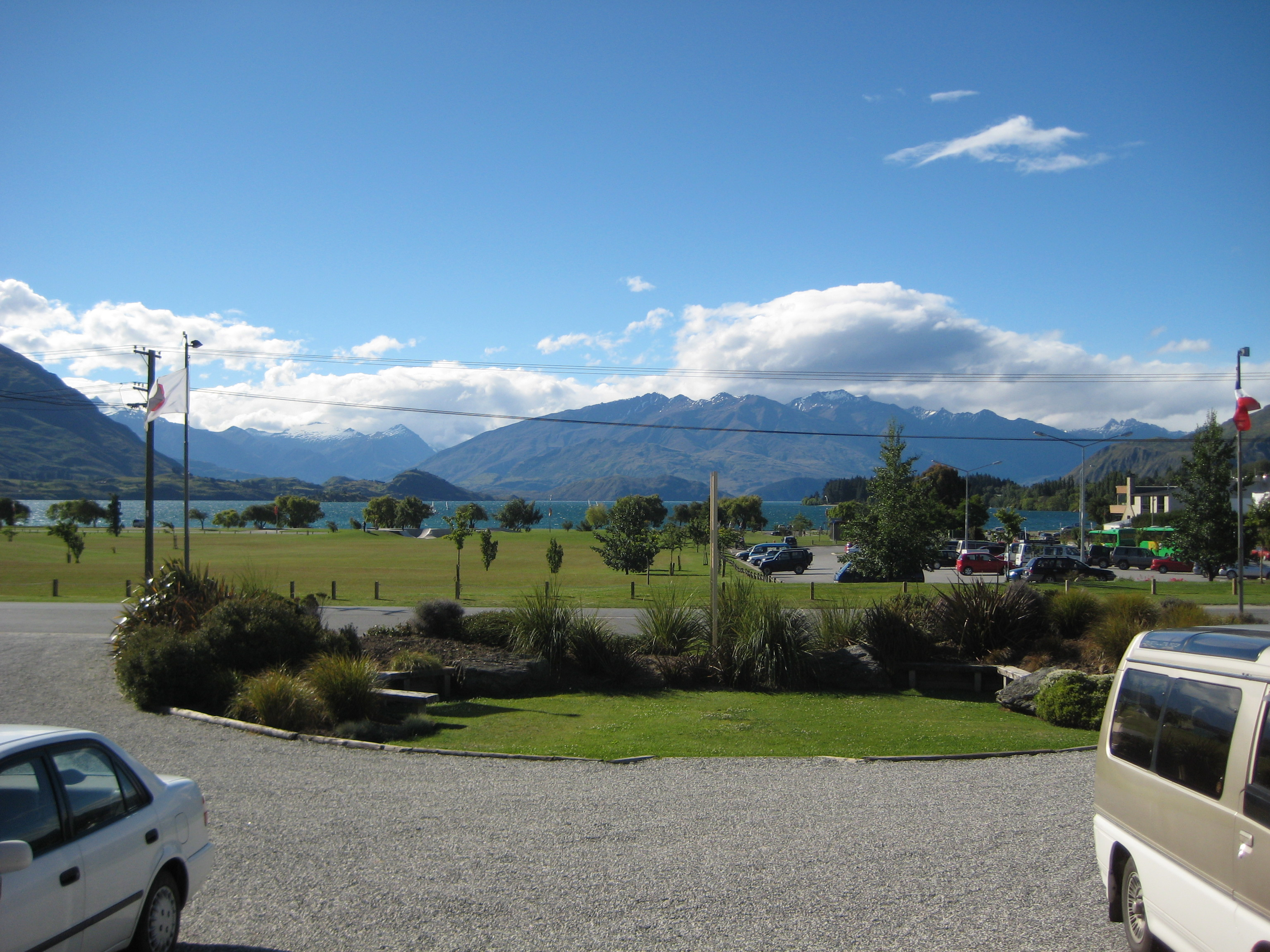 new zealand